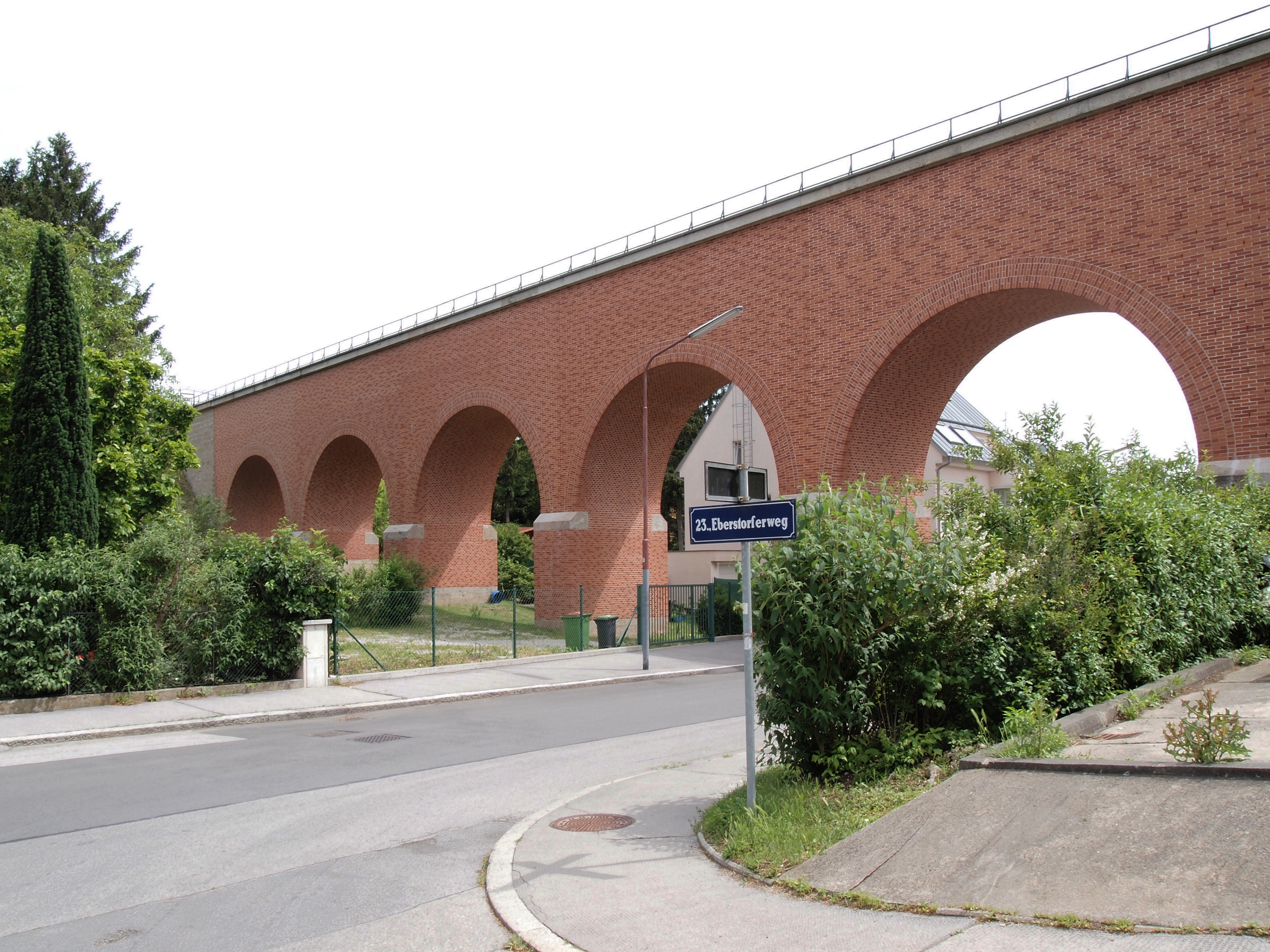 Aquädukt Speising, Wien Austria